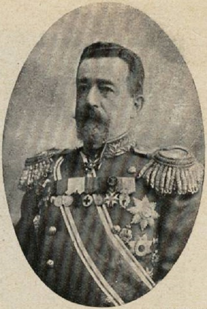 Фото из газеты «Новое Время» от 15 февраля 1914 г., в связи с назначением генерал-лейтенанта И. И. Вальберга на должность начальника Павловского военного училища.